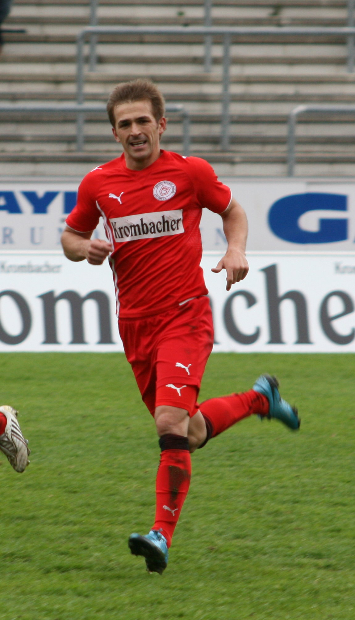 Hüsni Tahiri im Trikot der Sportfreunde Siegen in der Saison 2009/2010